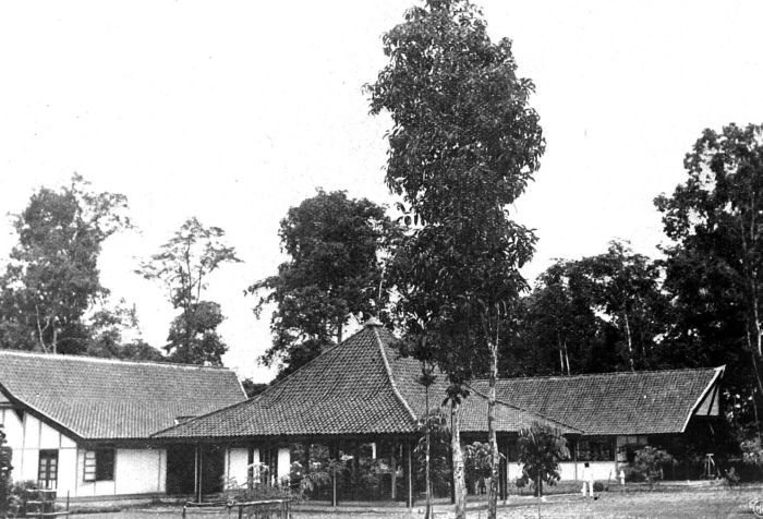 Repronegatief. Woning van de assistent-wedono te Metro, Sukadana, Sumatra